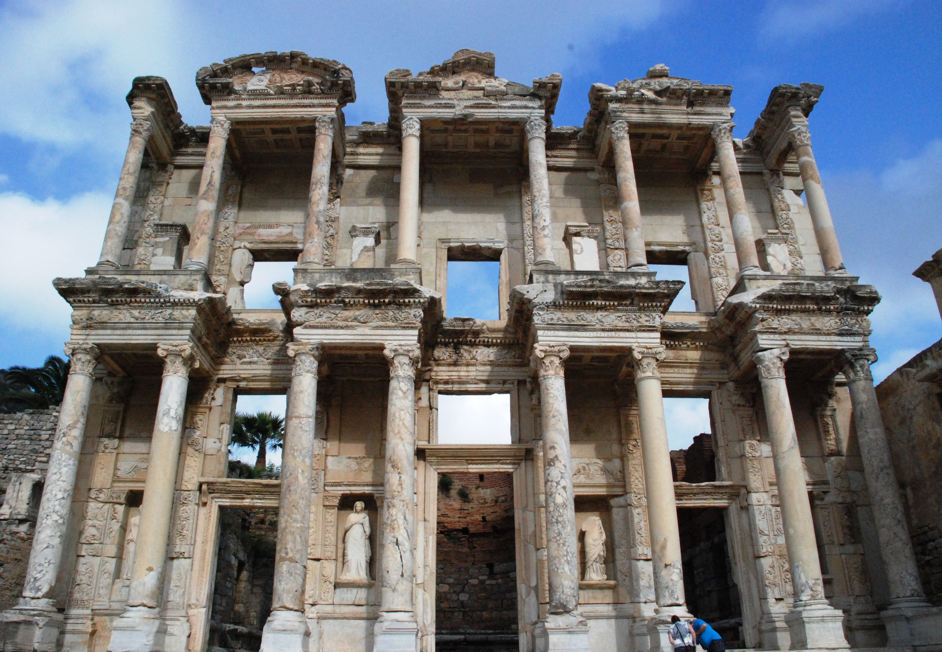 Ephesos, Celsus-Bibliothek